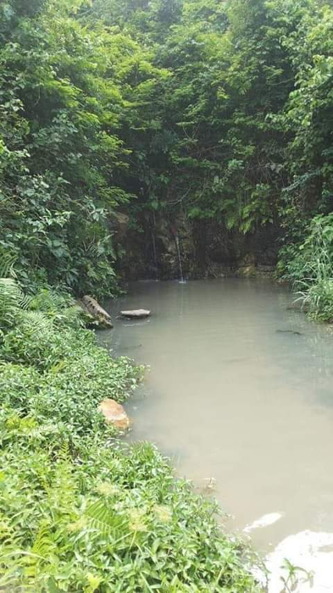 Petite chute d'eau de zangnanado, chute d'eau miraculé qui ne se seche jamais